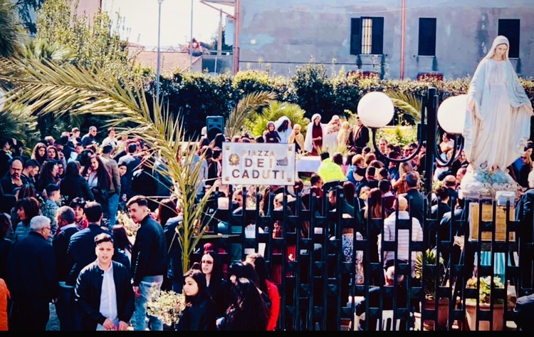 Piazza caduti smlf